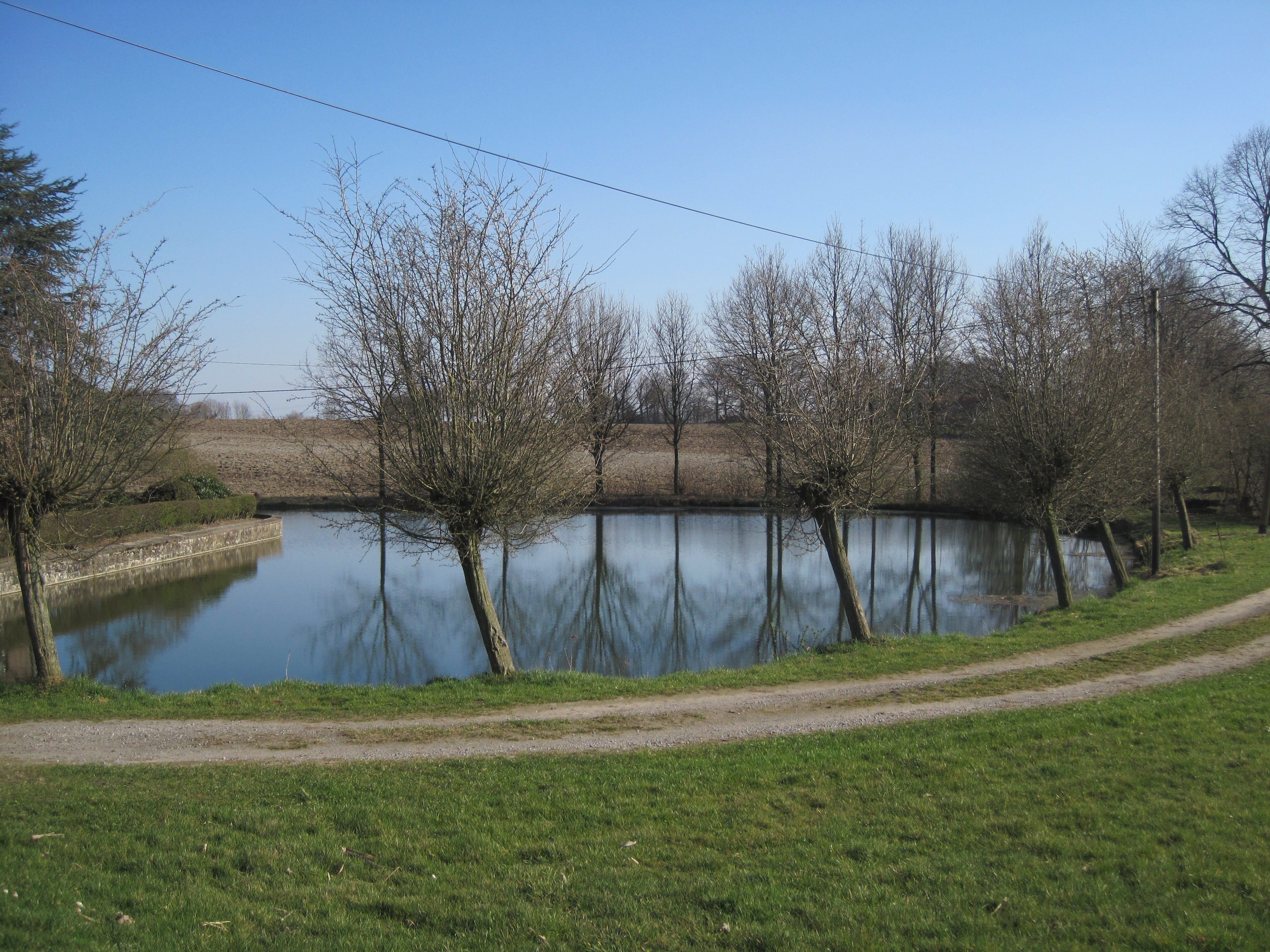 Das Foto zeigt die Umbegung von Haus Hardenberg in Werne-Nordick.